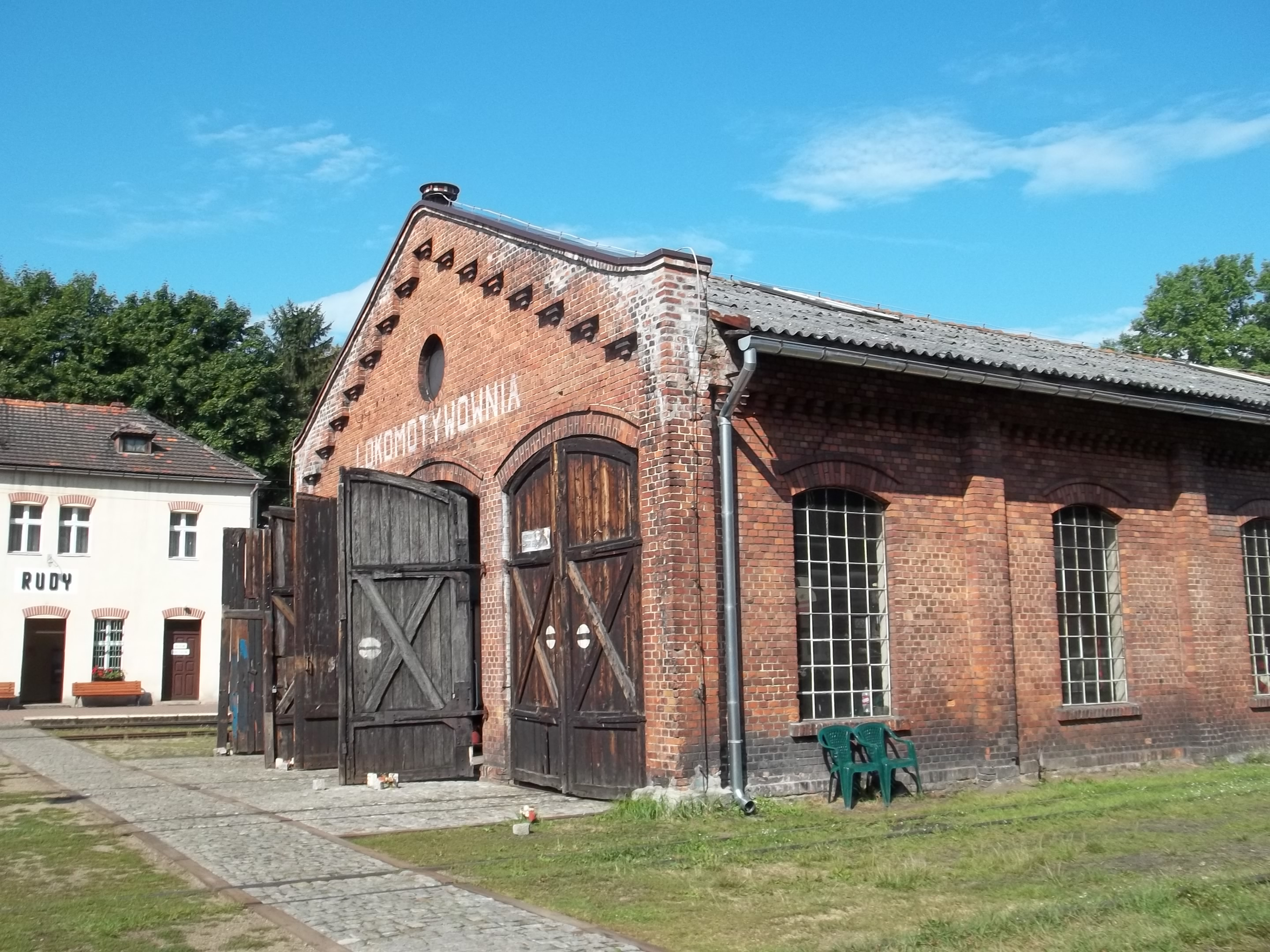 Lokomotywownia stacji kolei wąskotorowej w Rudach Raciborskich